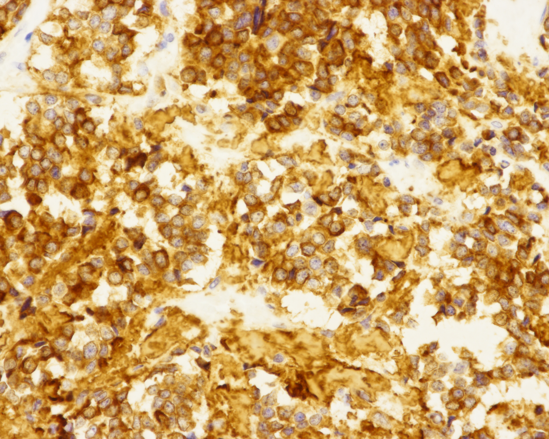 甲状腺髄様癌 カルシトニンが陽性